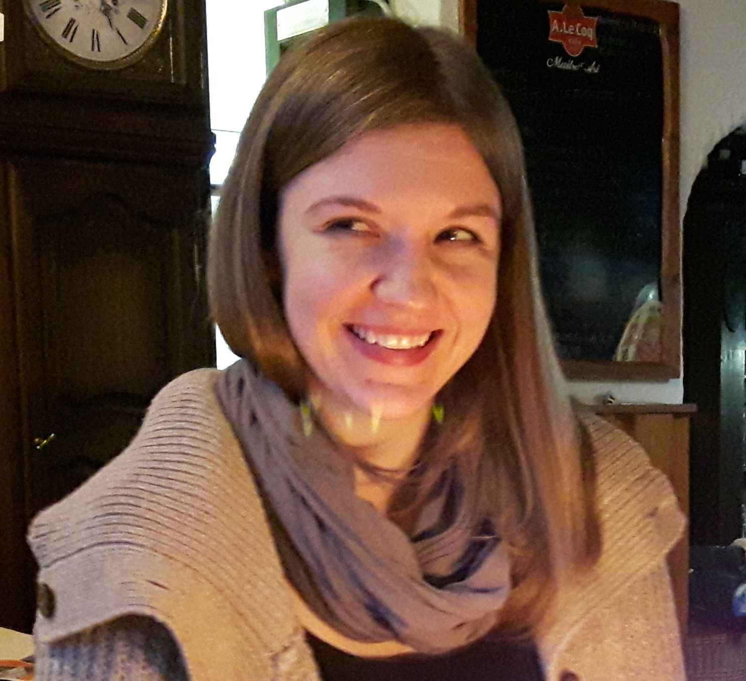 Maarja-Liisa Pilvik 2017